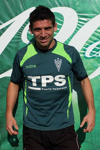 Edición de la fotografía "GonzaloBarriga.jpg", que muestra al jugador de fútbol Gonzalo Barriga.